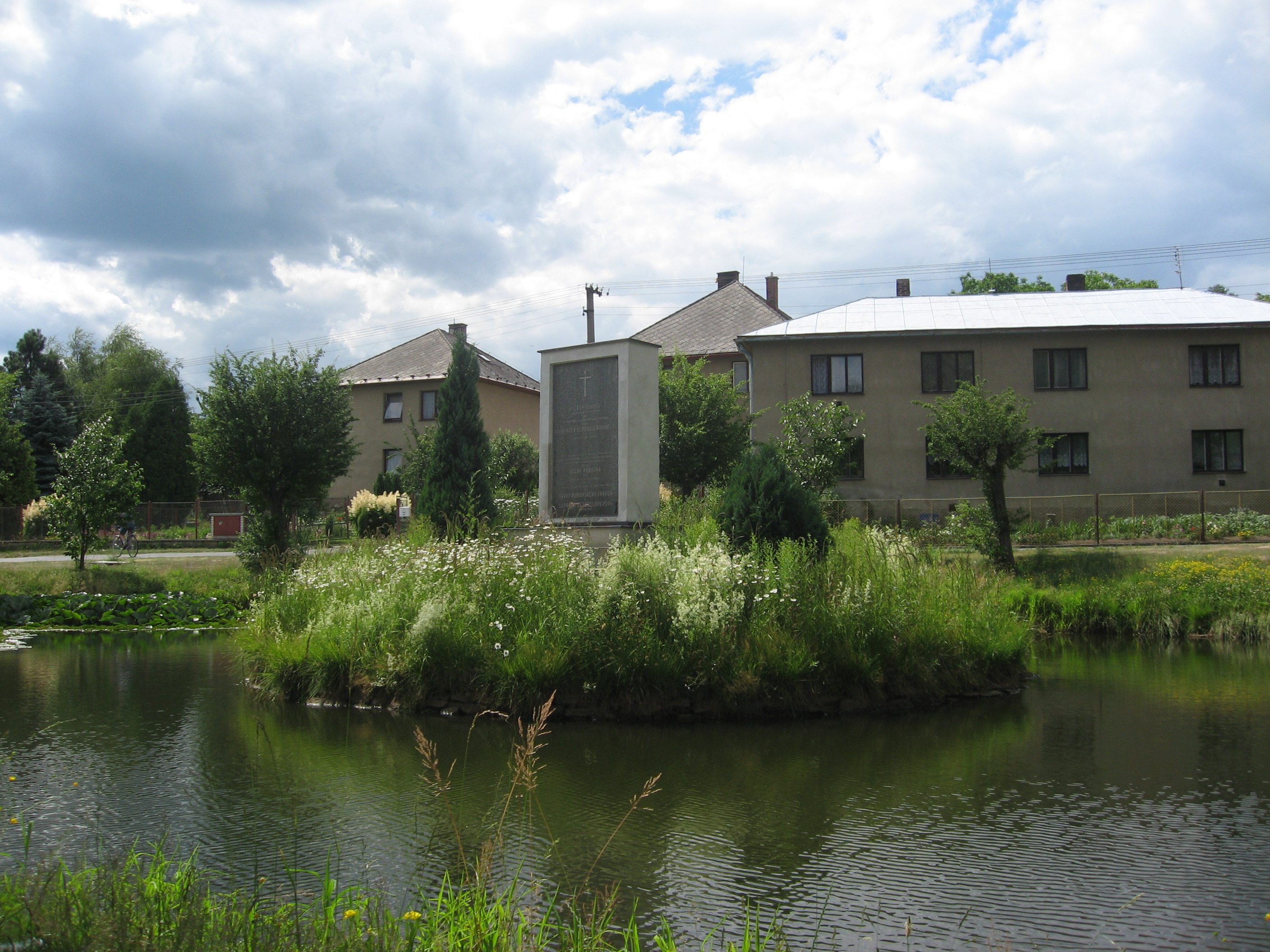 Věž, památník na ostrově